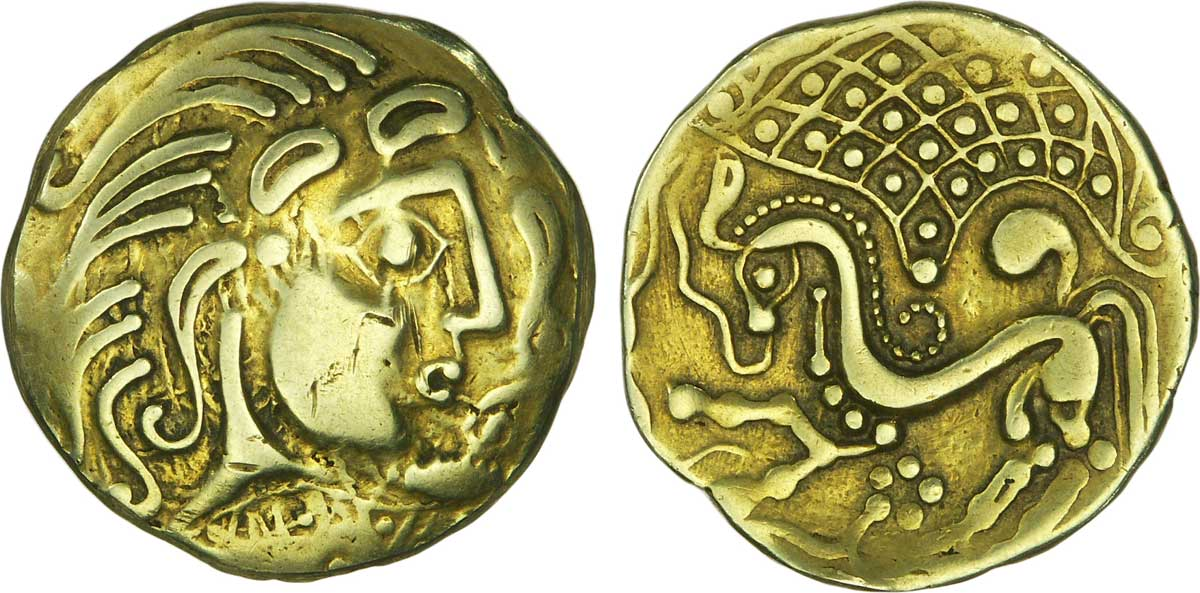 Description avers : tête stylisée à droite ; volute devant le visage ; “fruit” bien visible devant le menton . Description revers : cheval bondissant à gauche ; au-dessus, un filet ; entre les jambes, un fleuron et cinq globules posés en cercle .